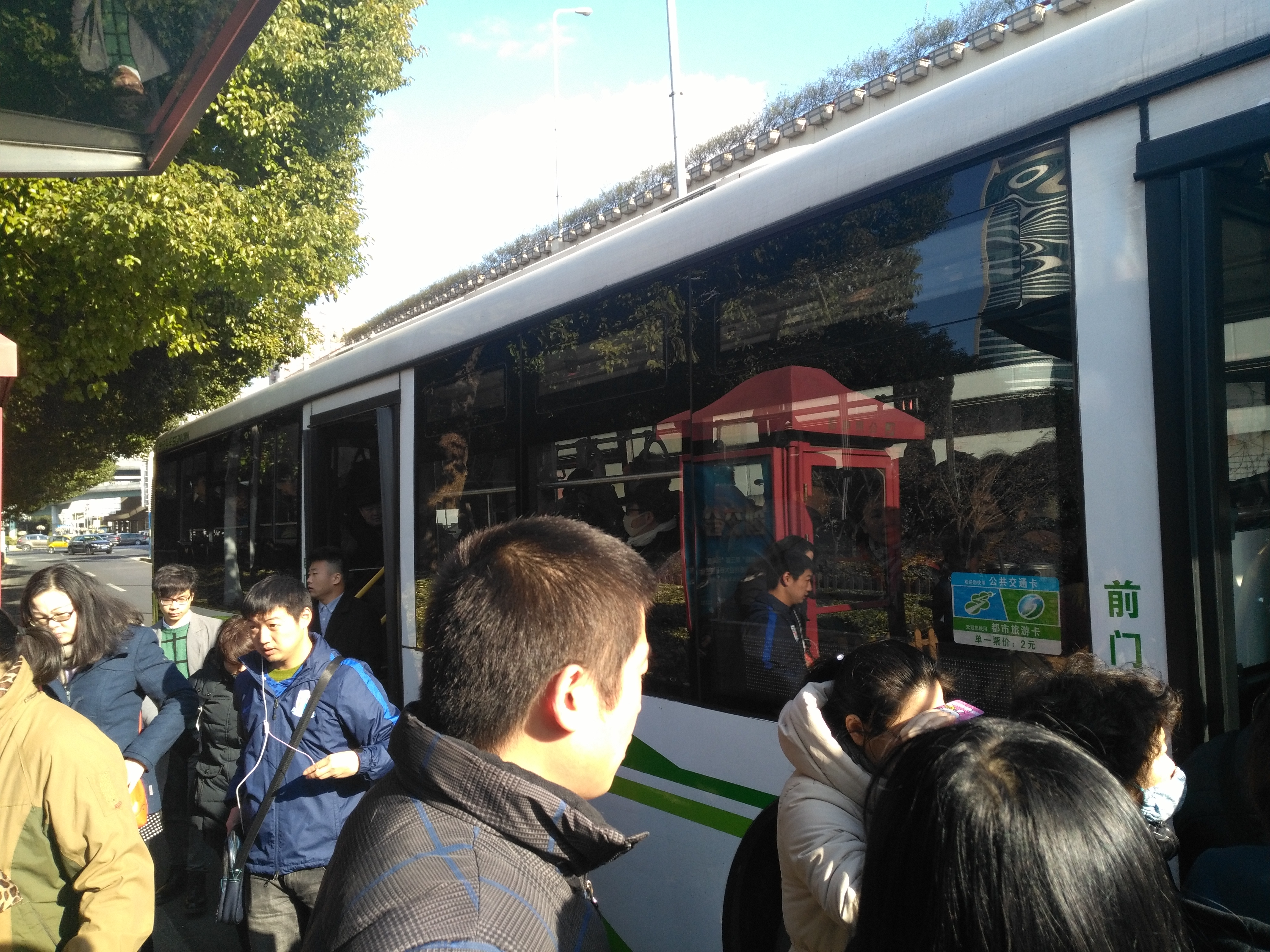 中文（中国大陆）: 71路在延安东路西藏中路站点载客